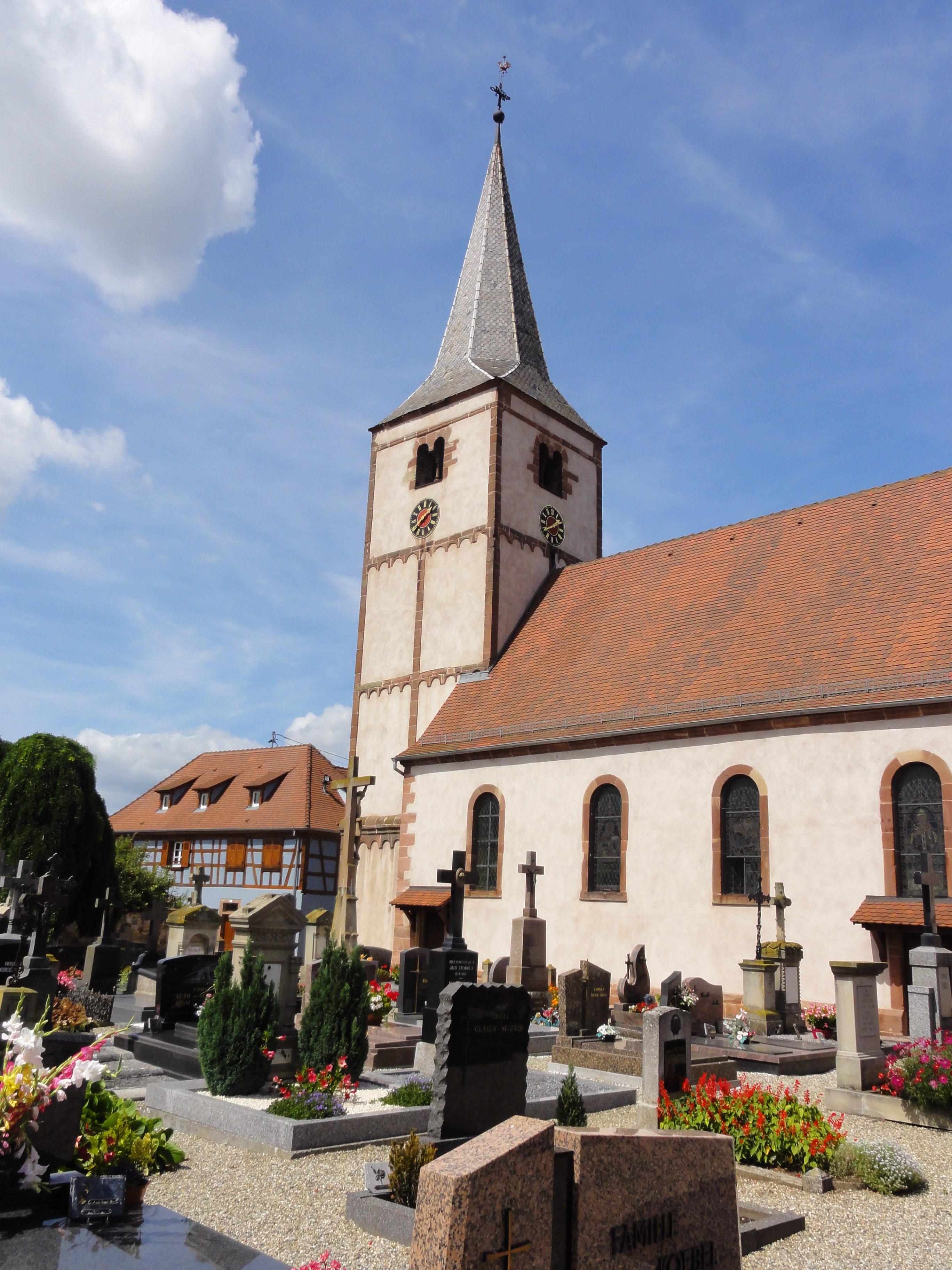 Alsace, Bas-Rhin, Église St Laurent de Gougenheim (IA67005582).